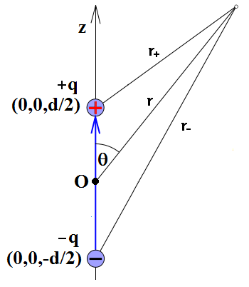 Schéma elektrického dipólu Dipole